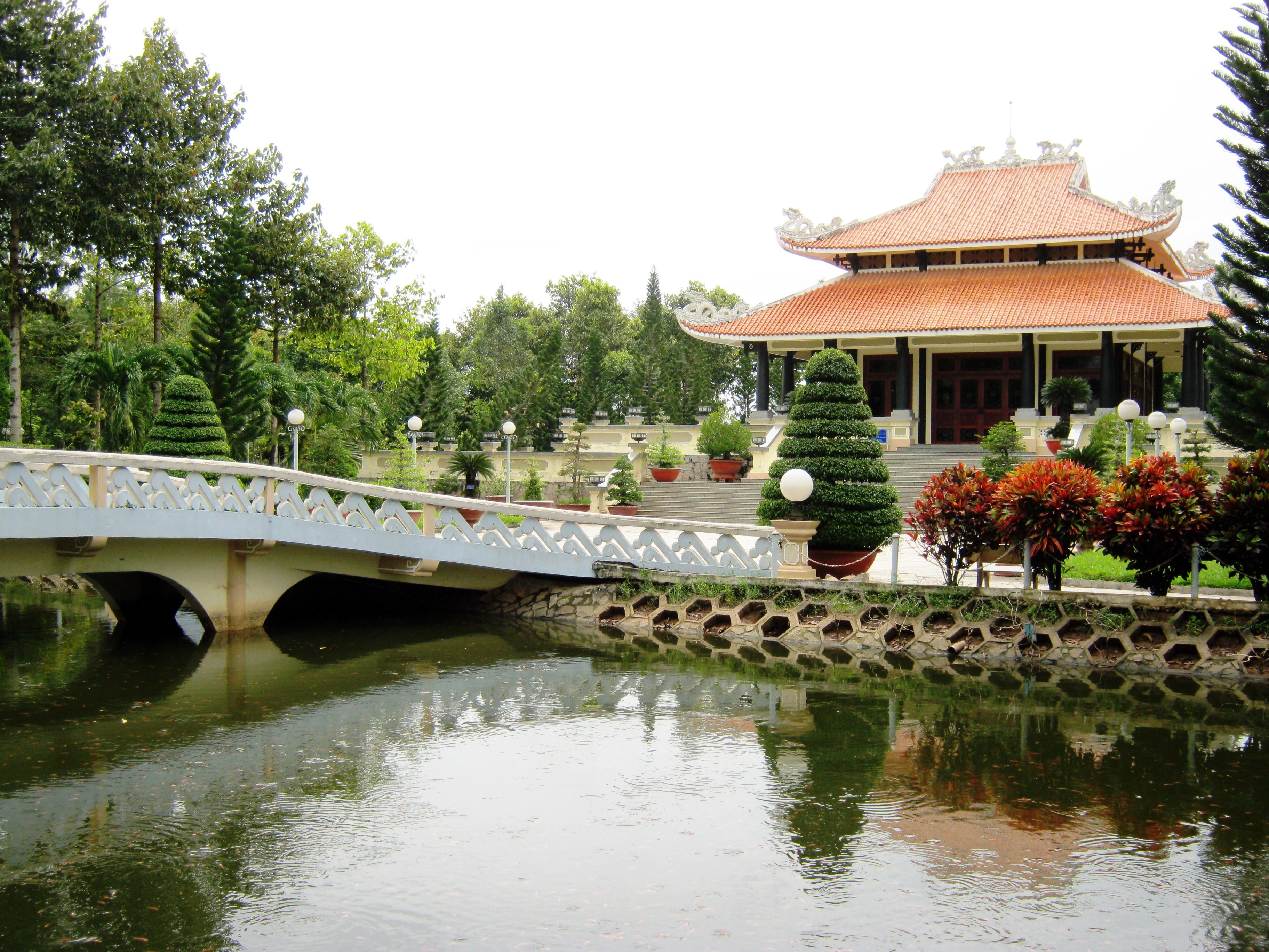 Bên phải ảnh là đền thờ Chủ tịch Tôn Đức Thắng (1888 - 1980) tọa lạc trong khu lưu niệm ông; trên cù lao Ông Hổ, thuộc xã Mỹ Hòa Hưng, thành phố Long Xuyên, tỉnh An Giang, Việt Nam.